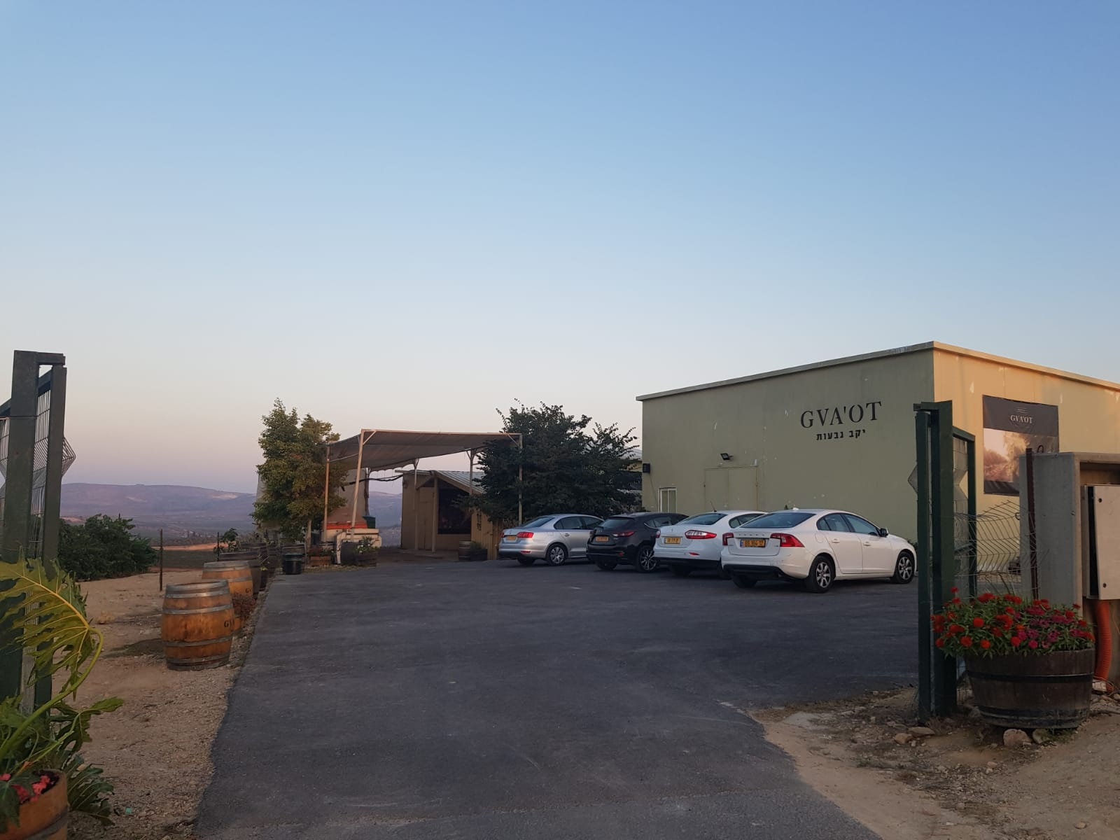 מרכז המבקרים יקב